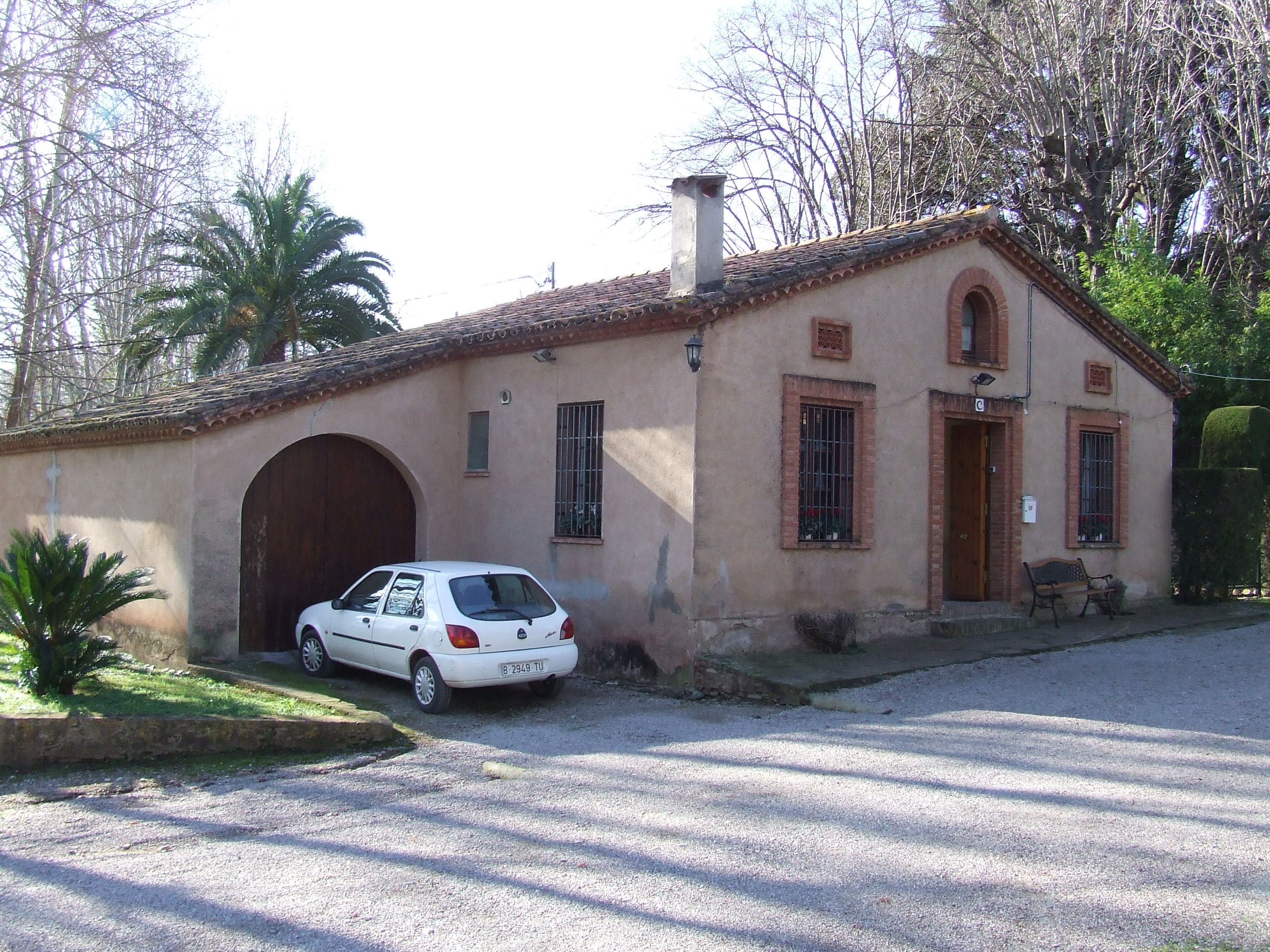 La masoveria de Can Noguera (Bigues, Bigues i Riells, Vallès Oriental)